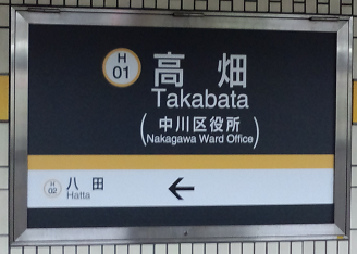 名古屋市営地下鉄 高畑駅 駅名標